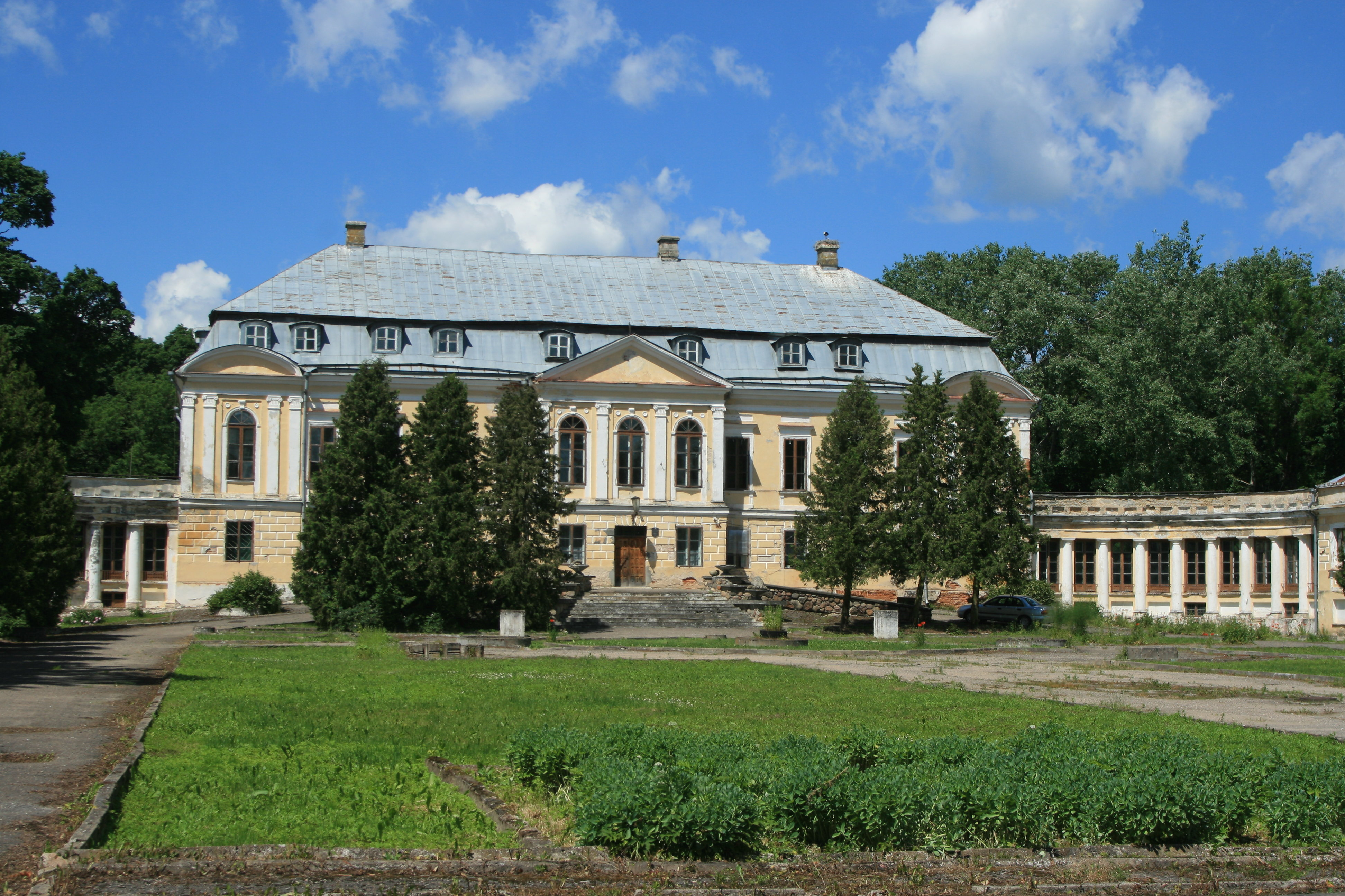 Sviack 231738, Belarus